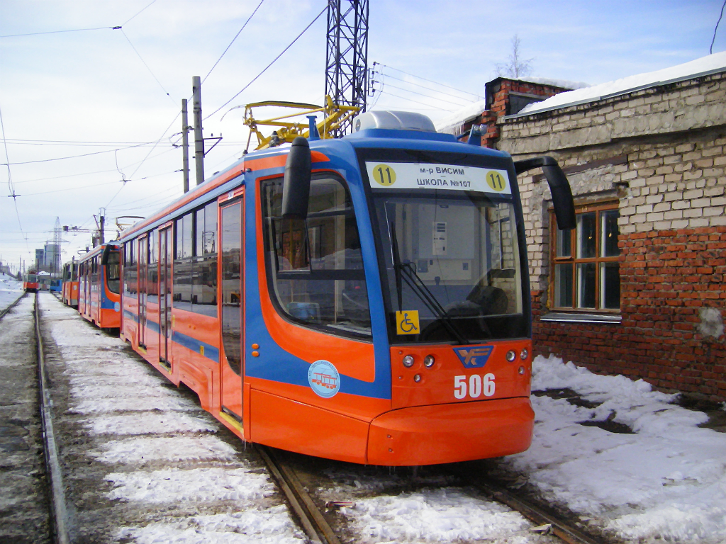 Депо Балатово; 71-623 № 506